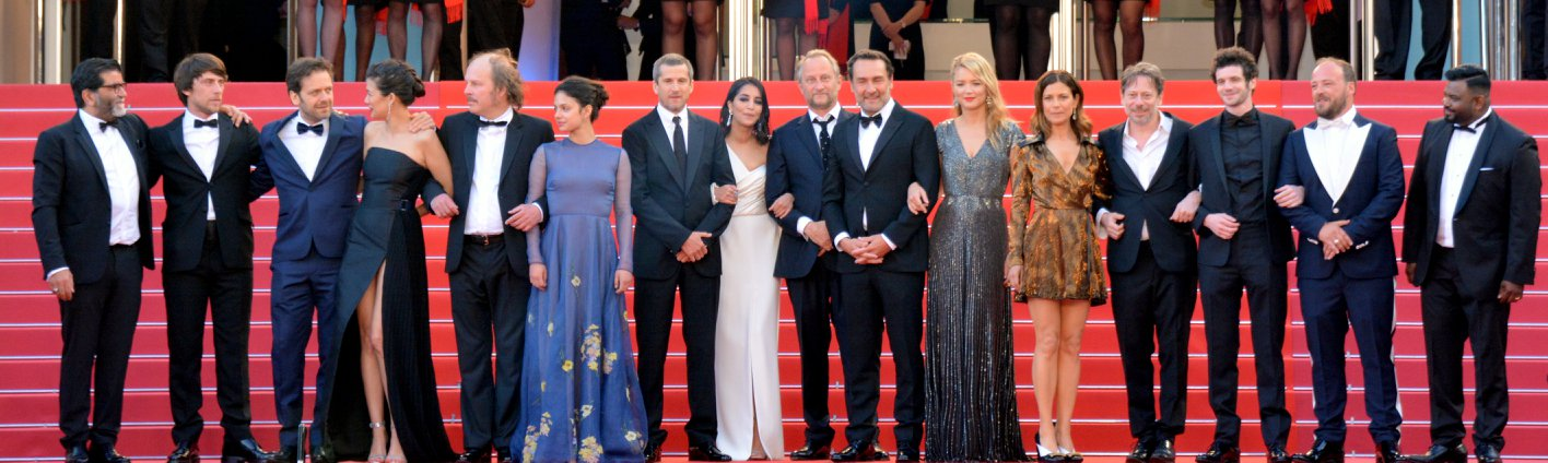 Présentation du film "Le Grand bain" au festival de Cannes